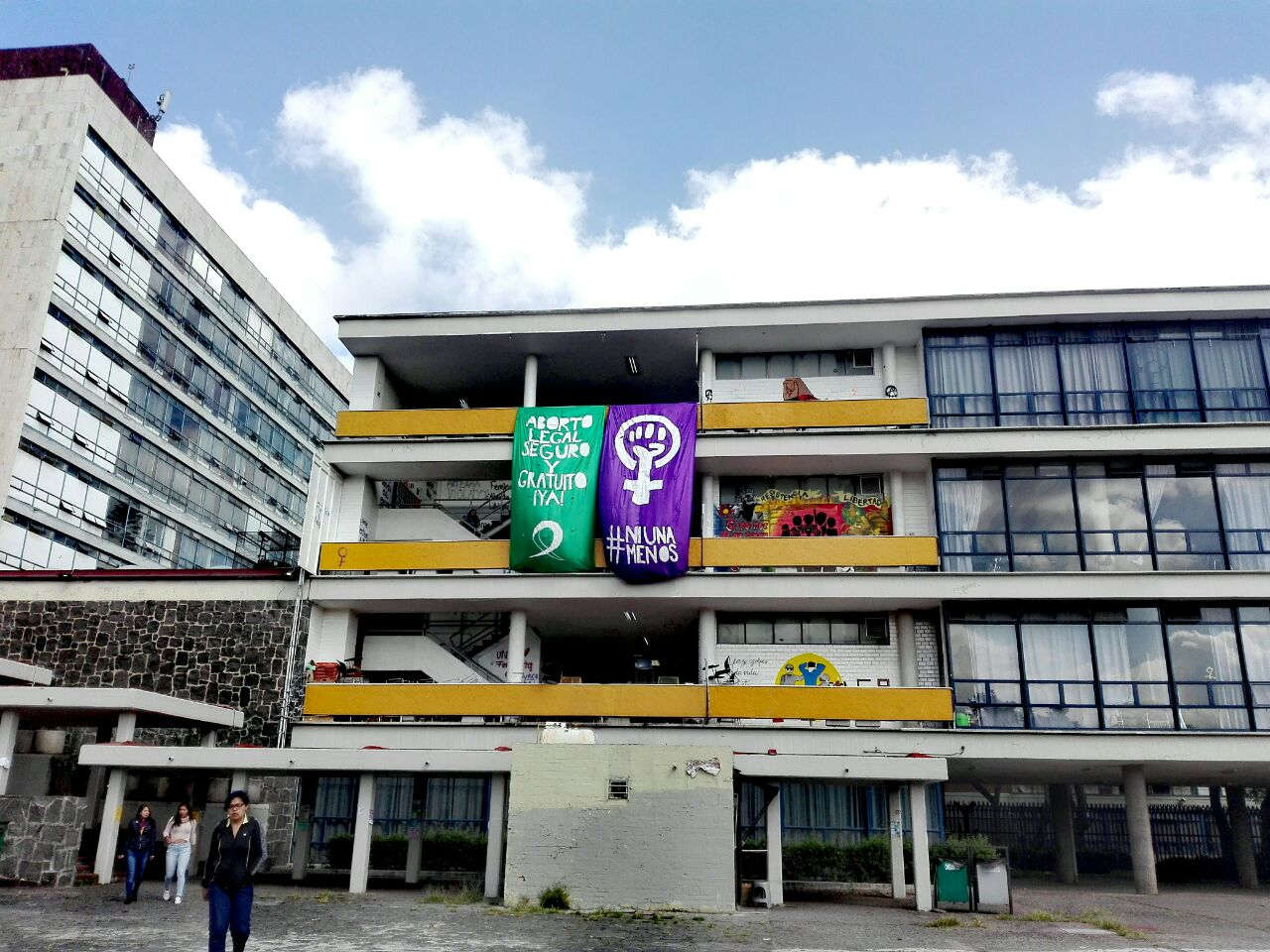 Mantas por paro feminista y separatista en la Facultad de Filosofía y Letras de la UNAM en protesta por la falta de respuesta de las autoridades a las denuncias de violencia sexual en la universidad.